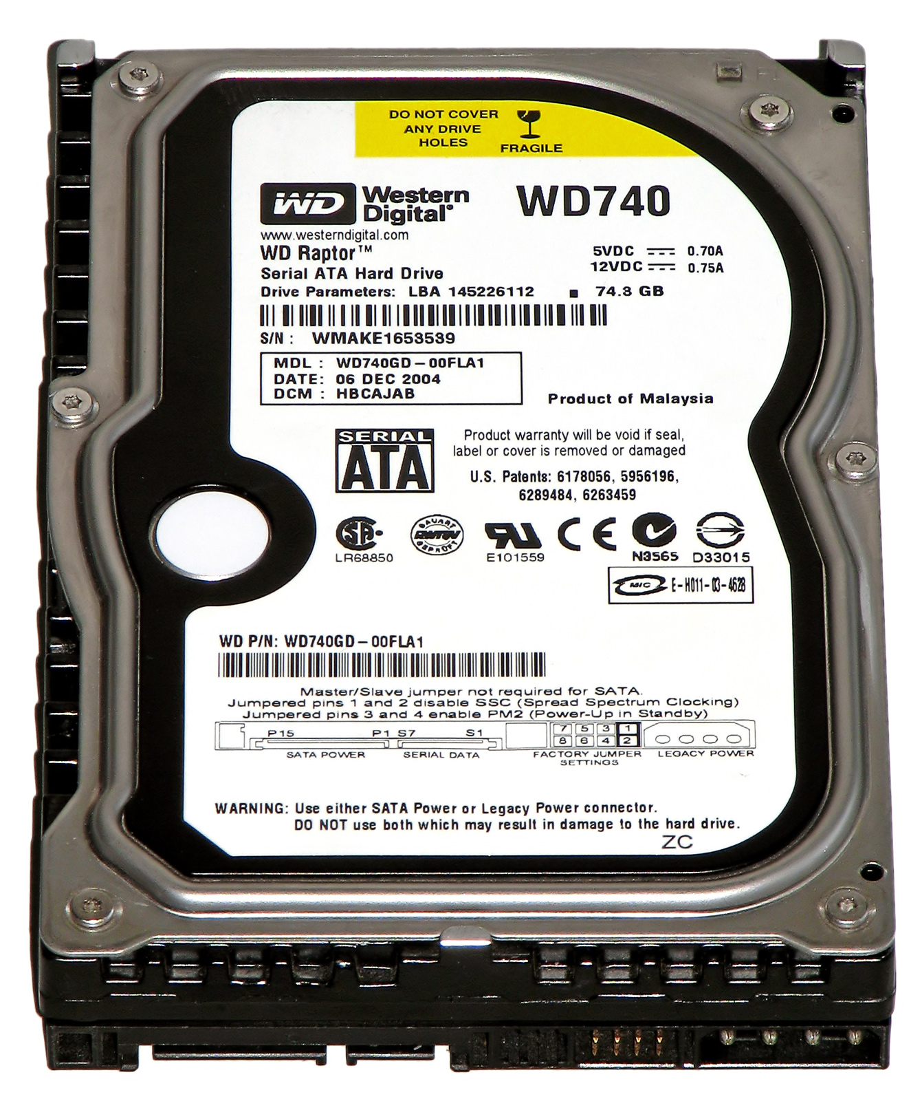 Dieses Bild zeigt eine SATA-Festplatte (Western Digital WD740 - 10.000 U/Min - 74 GB).